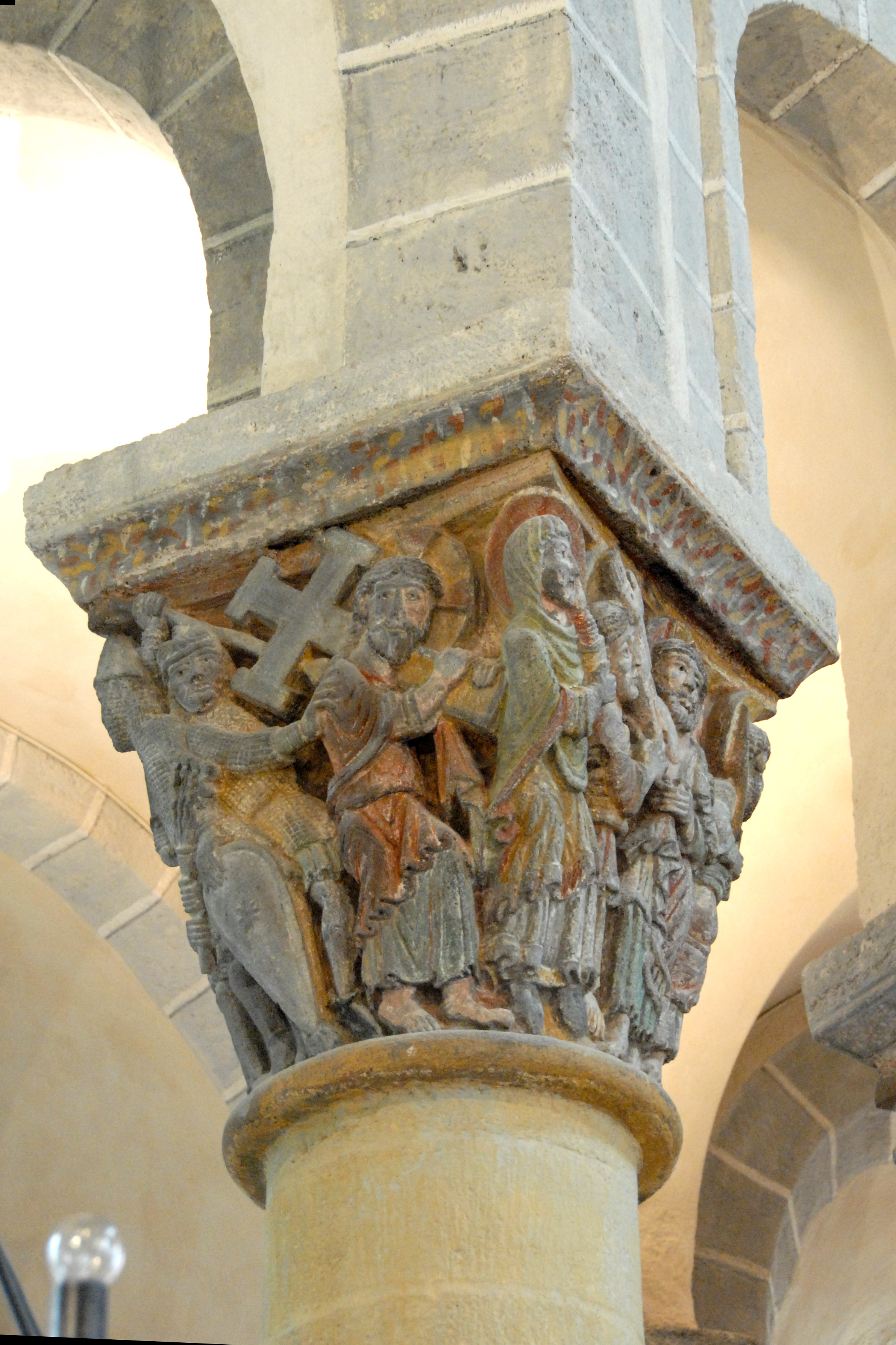 St.-Nectaire, Chorkapitell A, Seiten 3+4